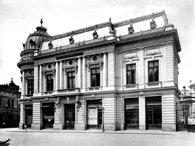 Palatul Fundatiei Universitare a fost construit in fata Palatului Regal, pe locul caselor lui Grigore Paucescu, in doua etape: 1891-1895 si 1914 dupa proiectul arhitectului Paul Gottereau. Inaugurarea a avut loc la 14 martie 1895. Devenita, dupa 1947, Biblioteca Centrala Universitara. photograph of Bucharest Palatul Fundaţiei Universitare 'Carol I'